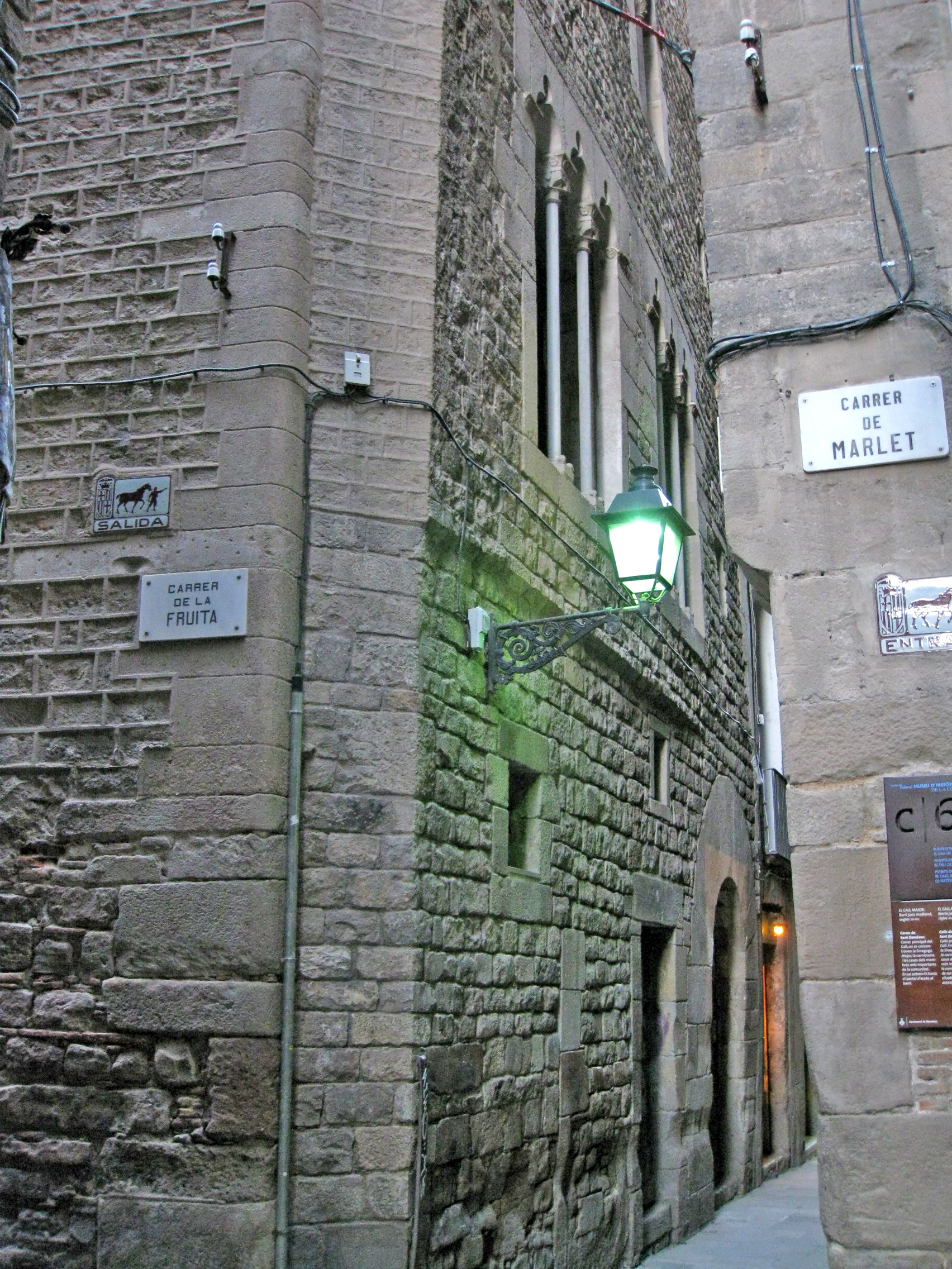 Edifici originari dels segles XIII-XIV, situat al carrer de Sant Domènec del Call núm. 6, a la cantonada amb el carrer de la Fruita, al barri Gòtic de Barcelona. Fou remodelat al segle XVII i a la dècada del 1960. Hi destaca el portal adovellat i les finestres coronelles i geminades.